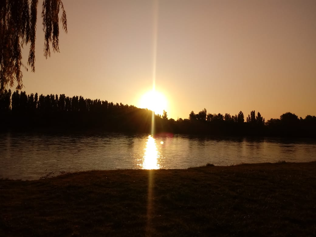 Choele Choel es una de las localidades del Valle Medio de la Provincia de Río Negro. En la imagen se puede ver el río en un atardecer en la isla, donde concurren personas todos los días.